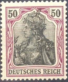 Germania-Marke